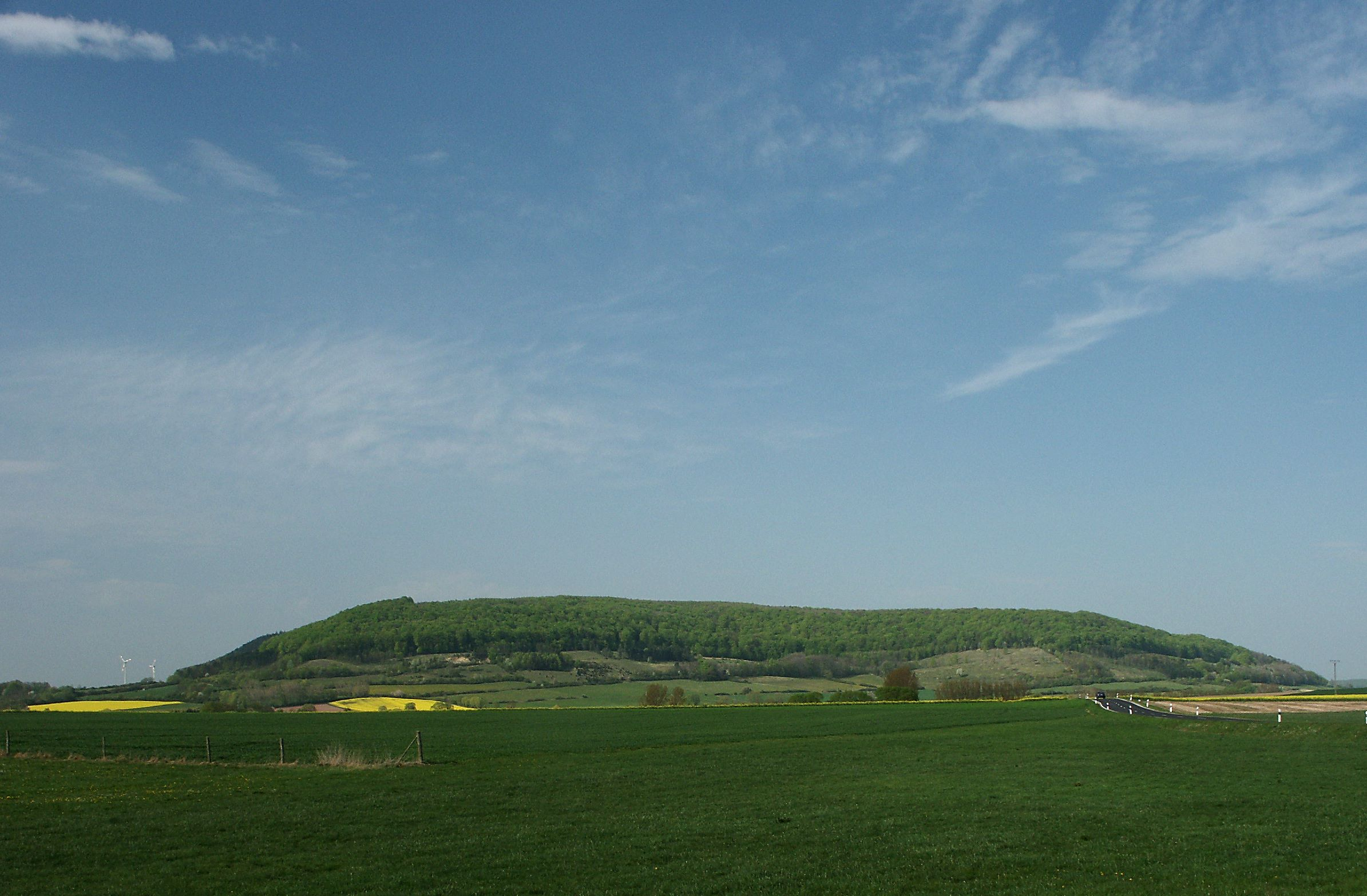 Der Dreienberg, der nördlichste Berg der Rhön. Ansicht von Süden, in der Nähe von Schenklengsfeld-Hilmes, aus fotografiert.